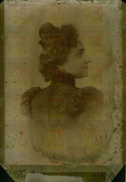 Fotografia di Adelaide Bernardini, scrittrice, moglie di Luigi Capuana